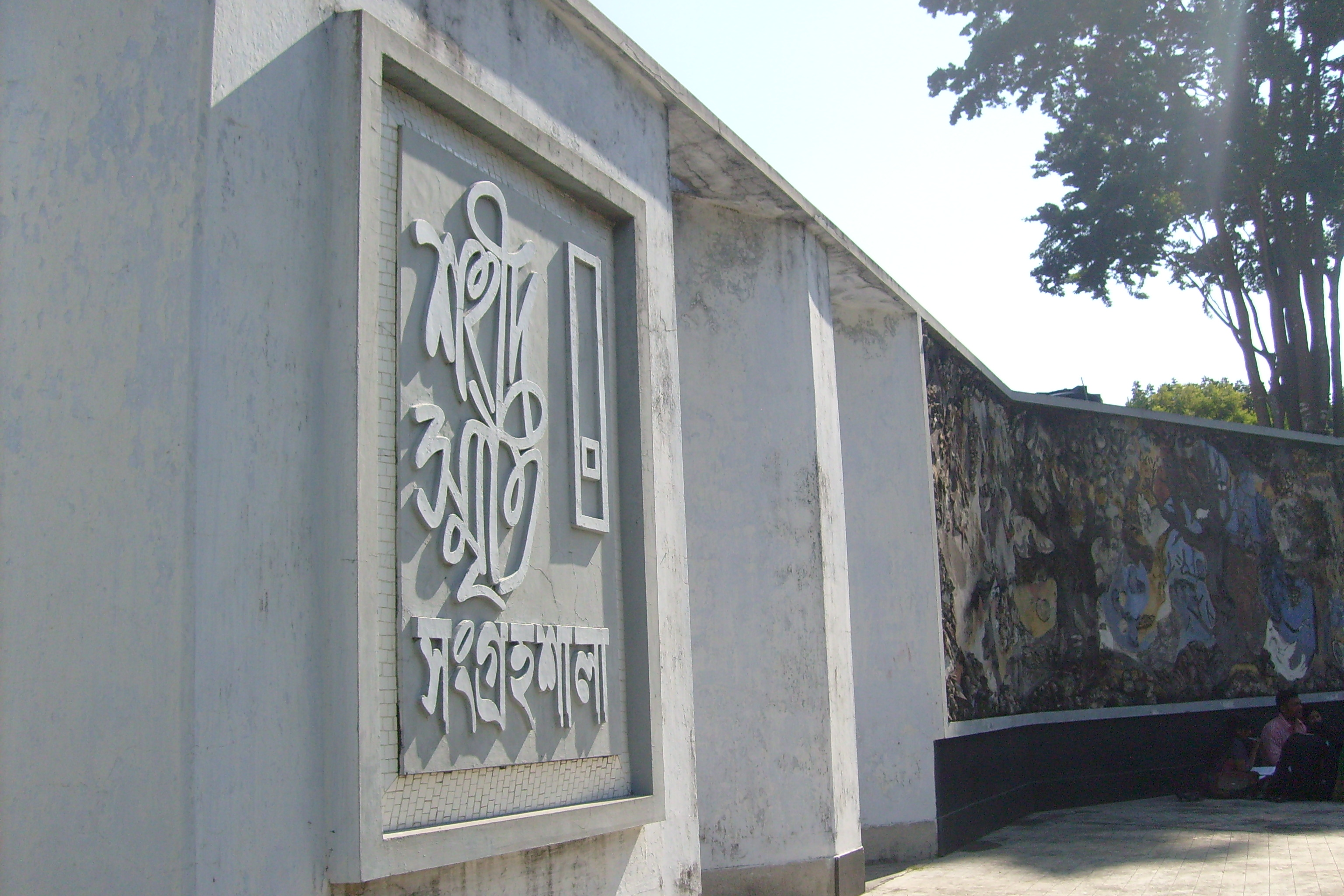 Rajshahi University, Rajshahi, Bangladesh